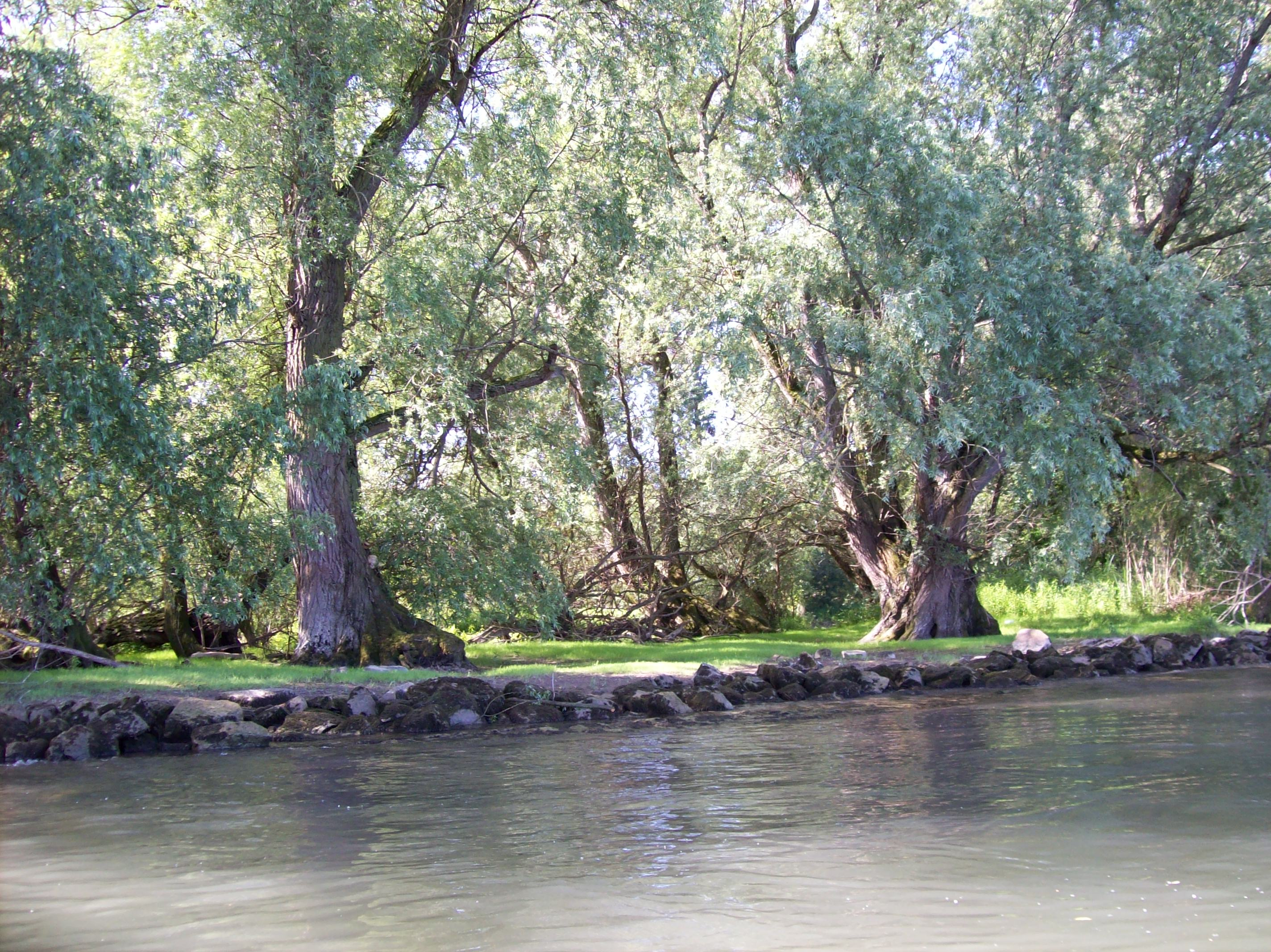 Auwald (NSG) bei Budenheim (Landkreis Mainz-Bingen) am Rhein – ohne genauere Ortsangabe kommen „bei Budenheim“ mehrere Naturschutzgebiete in Frage: v.a. NSG Mombacher Rheinufer (überwiegend in Mainz gelegen) und NSG Haderaue-Königsklinger Aue.